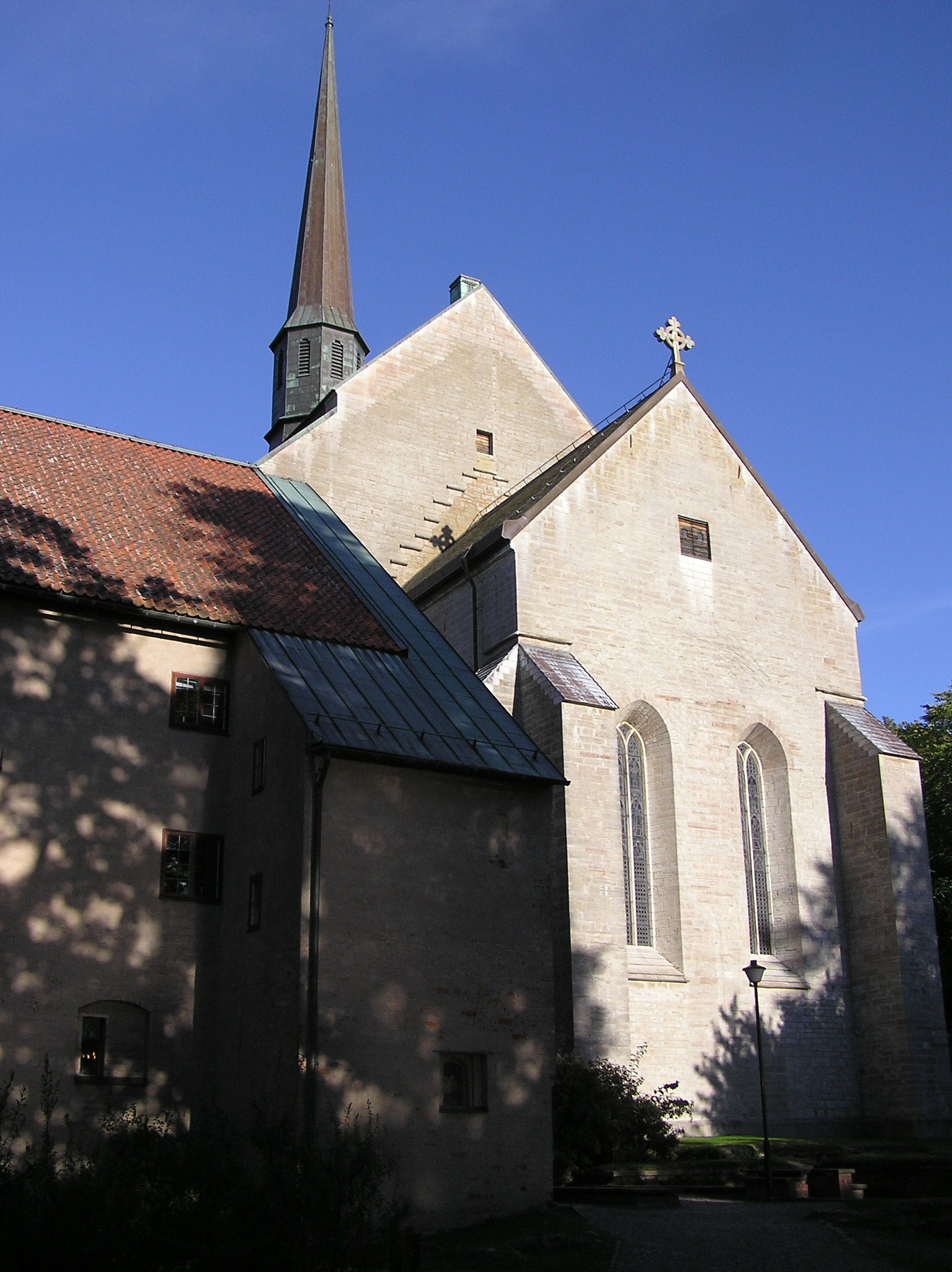 Vadstena Convent Church